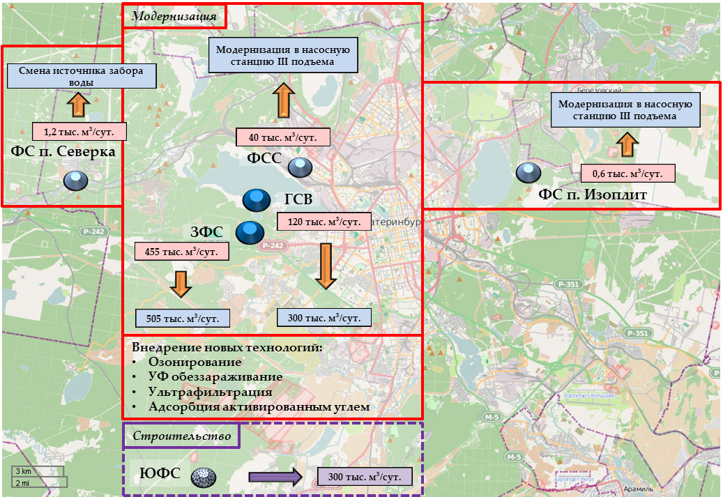 Фильтровальные станции города Екатеринбурга и планы по их модернизации This map may be incomplete, and may contain errors. Don't rely solely on it for navigation.